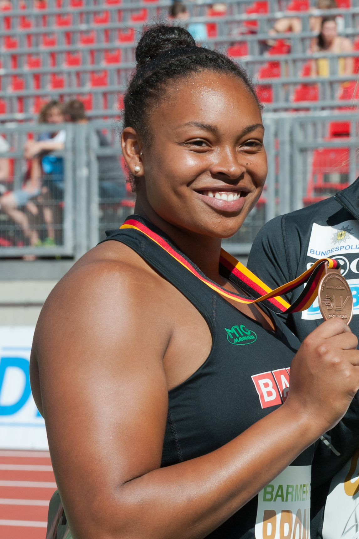 Deutsche Leichtathletik-Meisterschaften 2015: Frauen Diskuswurf - Shanice Craft, MTG Mannheim